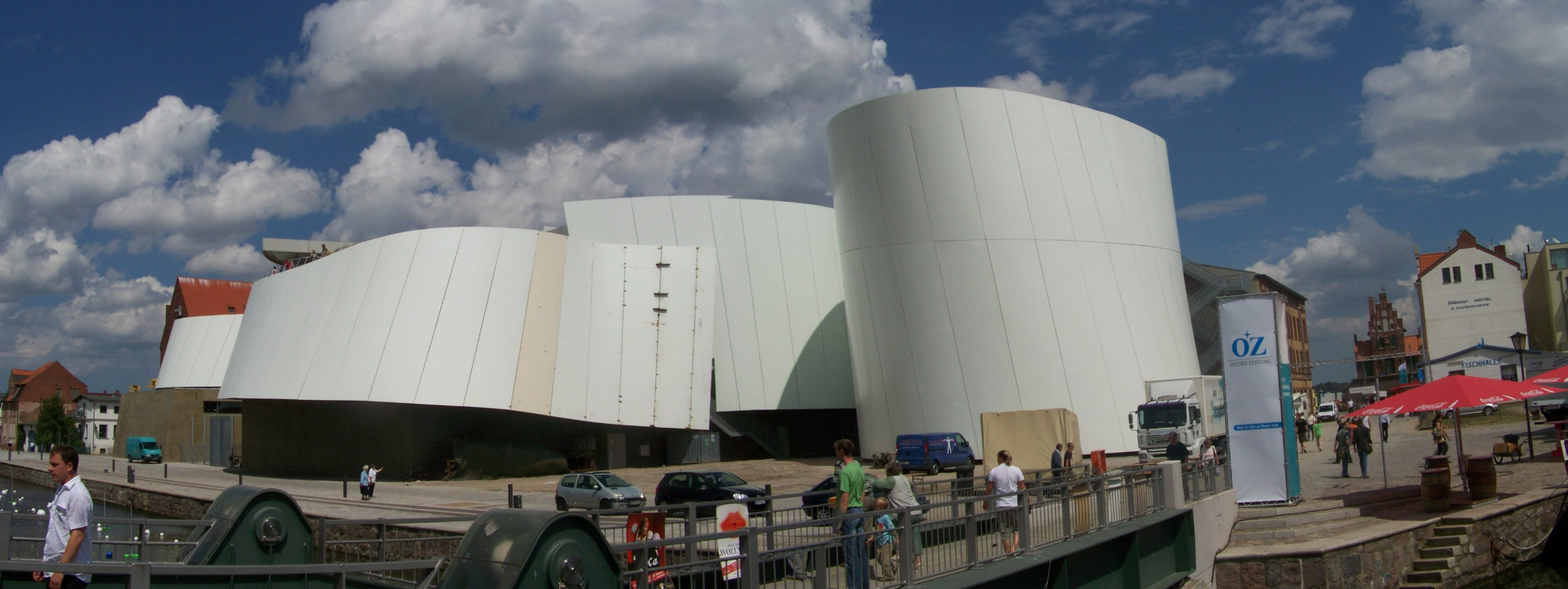 Das Ozeaneum in Stralsund. Panaoramaansicht von der Stadtseite aus.